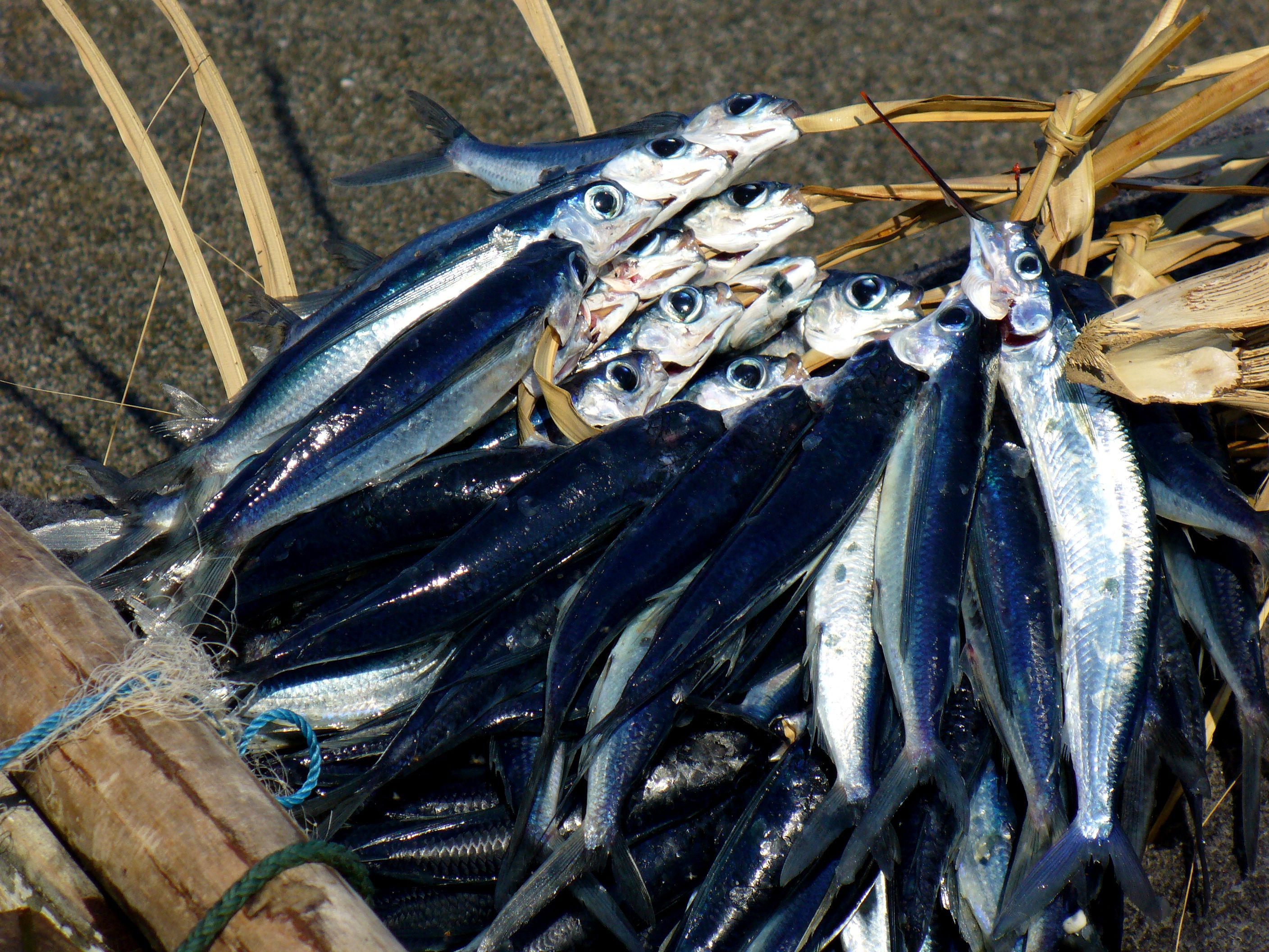 Maubara, East Timor